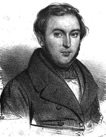 Dr. Giraudeau de Saint-Gervais.